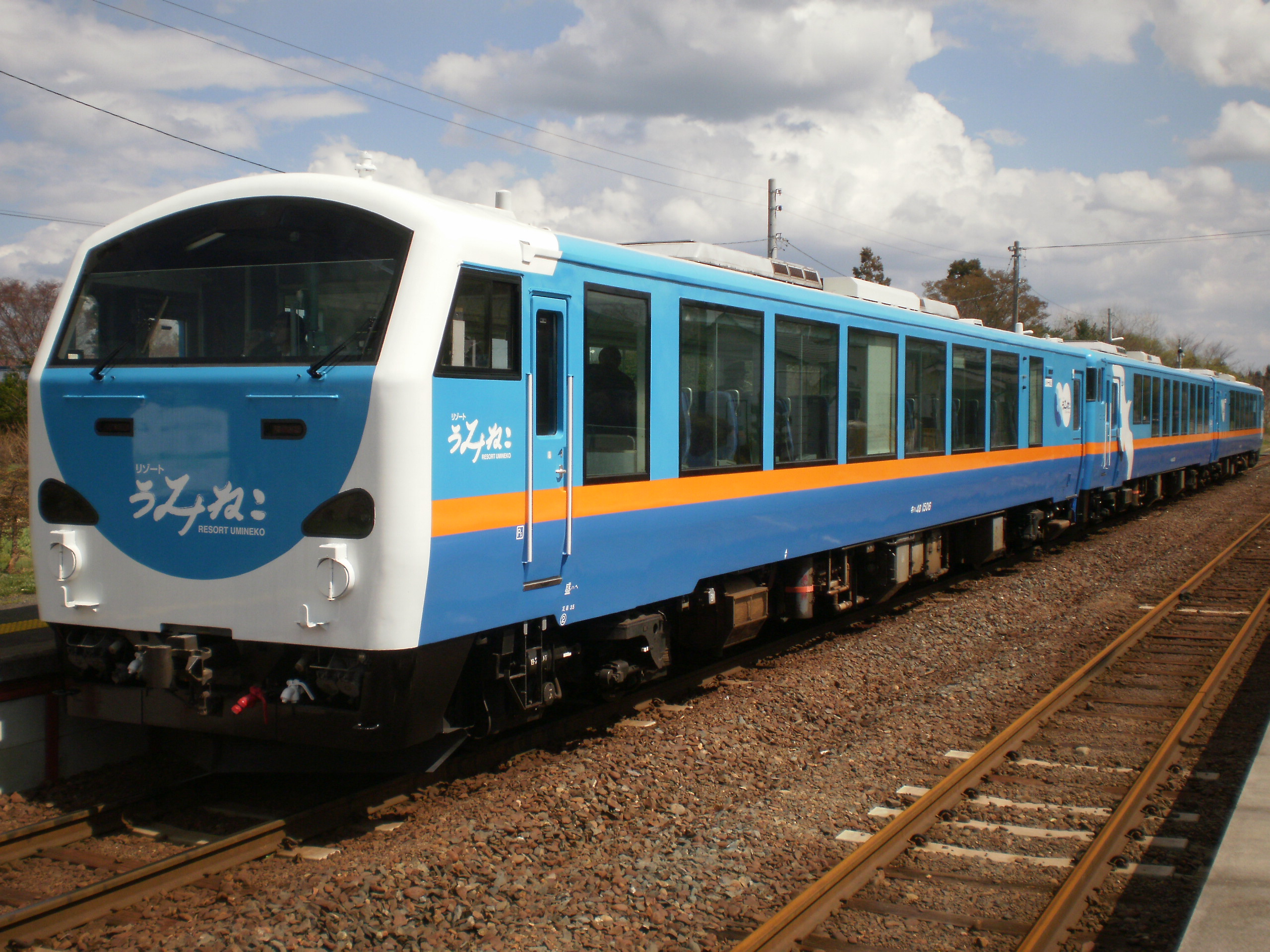 東日本旅客鉄道（JR東日本）キハ40系 『リゾートうみねこ』編成